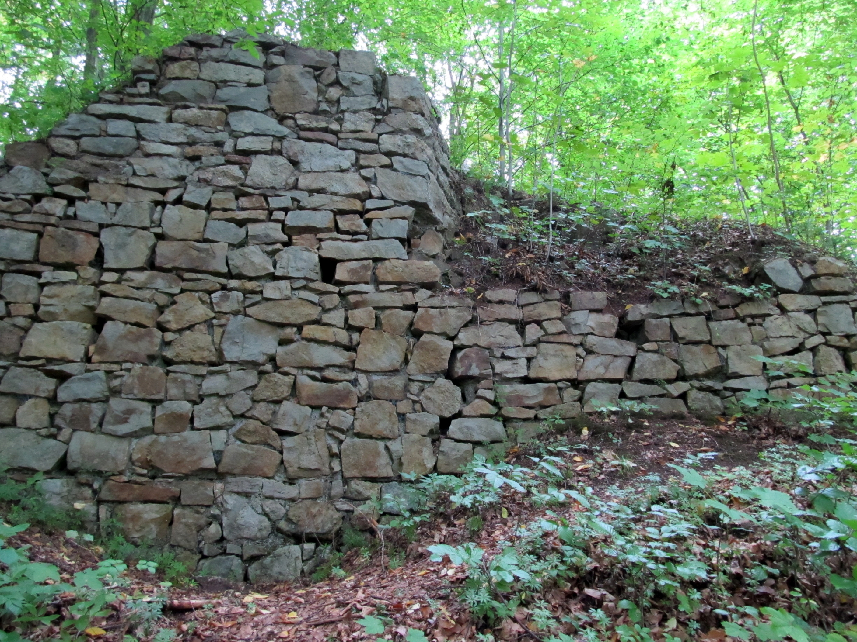 Hrad Červená Hora, zřícenina (Červená Hora), ostroh nad řekou Úpou, Červená Hora